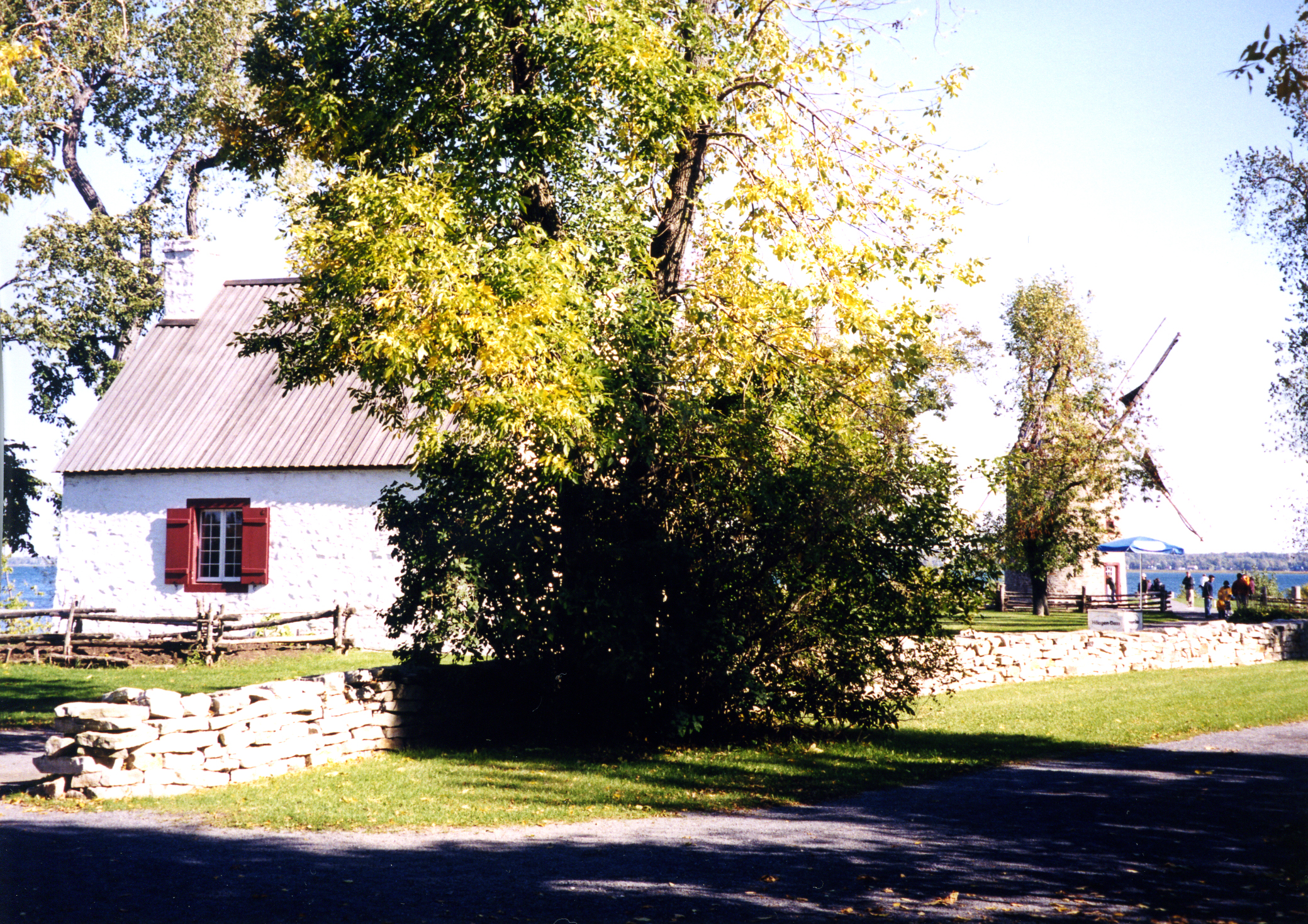 Maison du meunier (à gauche en avant-plan) et Moulin à vent de la Pointe-du-Moulin (à droite en arrière-plan), situés à l'Ile Perrot (Montérégie, Québec).